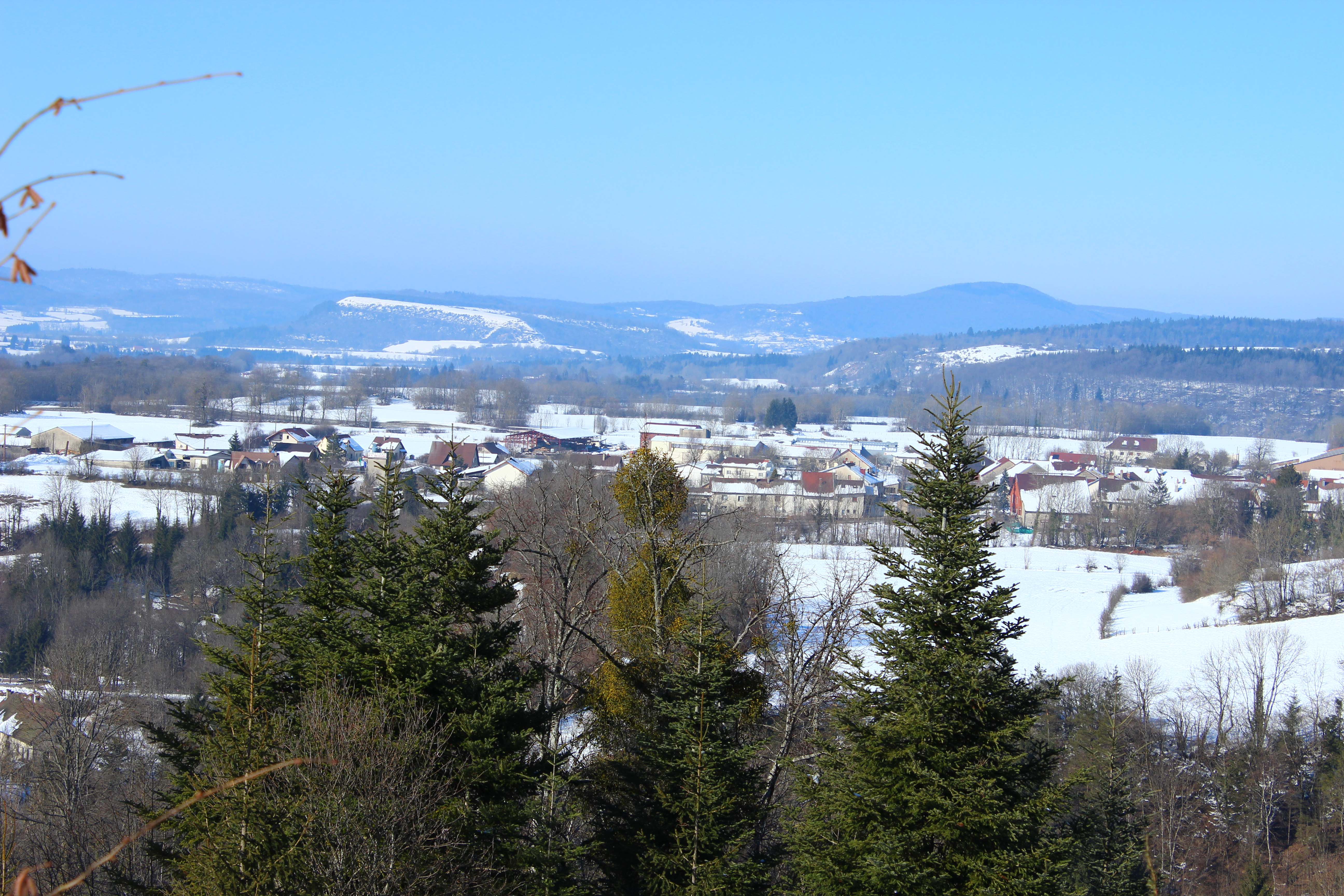 Le village de Cogna (Jura, France) vu depuis le sud en hiver.